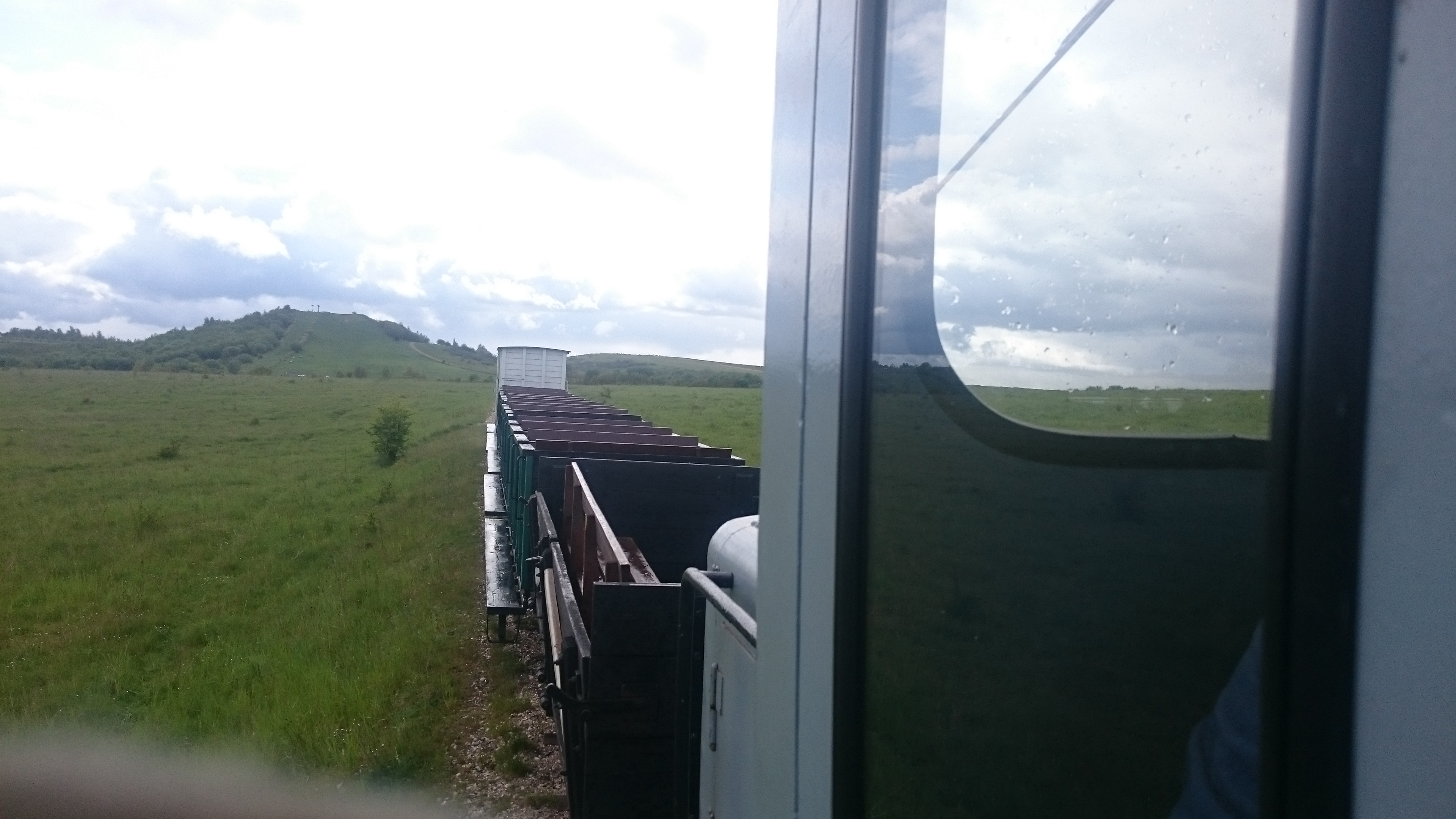 En togstamme trukket af M24.